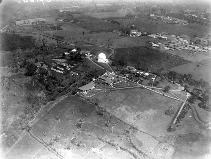 Negatief. Luchtfoto van de Sterrenwacht te Lembang